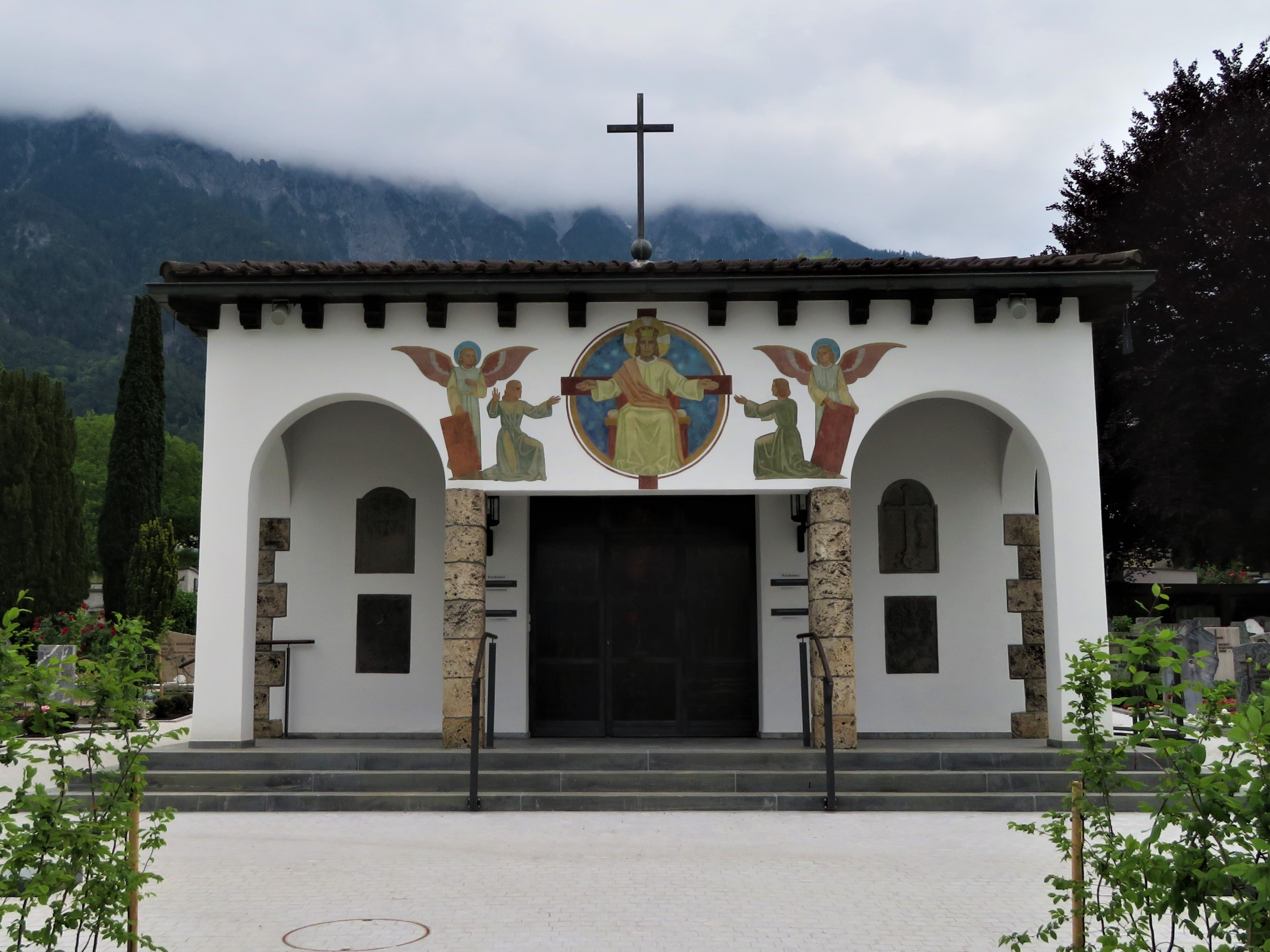 Friedhofskapelle in Schaan, Liechtenstein. Erbaut 1934 nach Plänen des deutschen Architekten Erwin Hinderer.